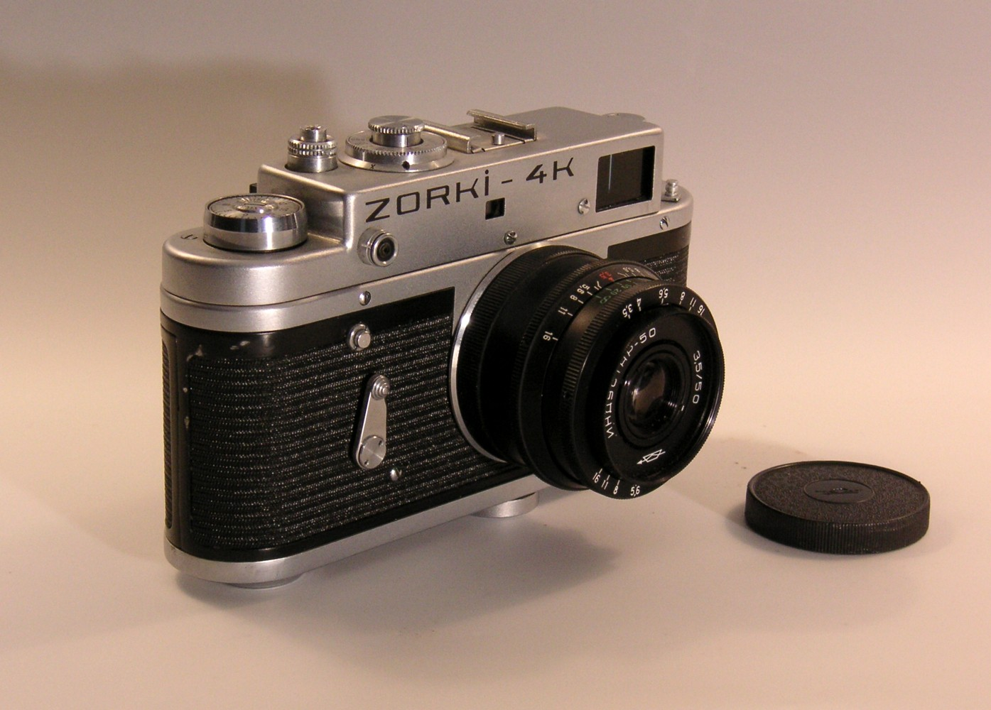 Ryssk kamera "Zorki-4K"